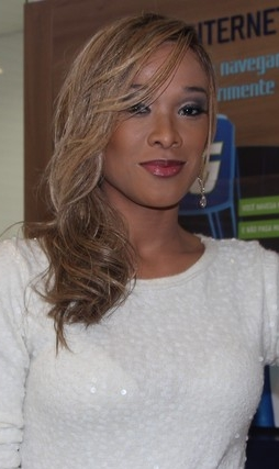 Leilah Moreno na loja da TIM do Shopping Eldorado em São Paulo para o lançamento do novo Iphone 6.